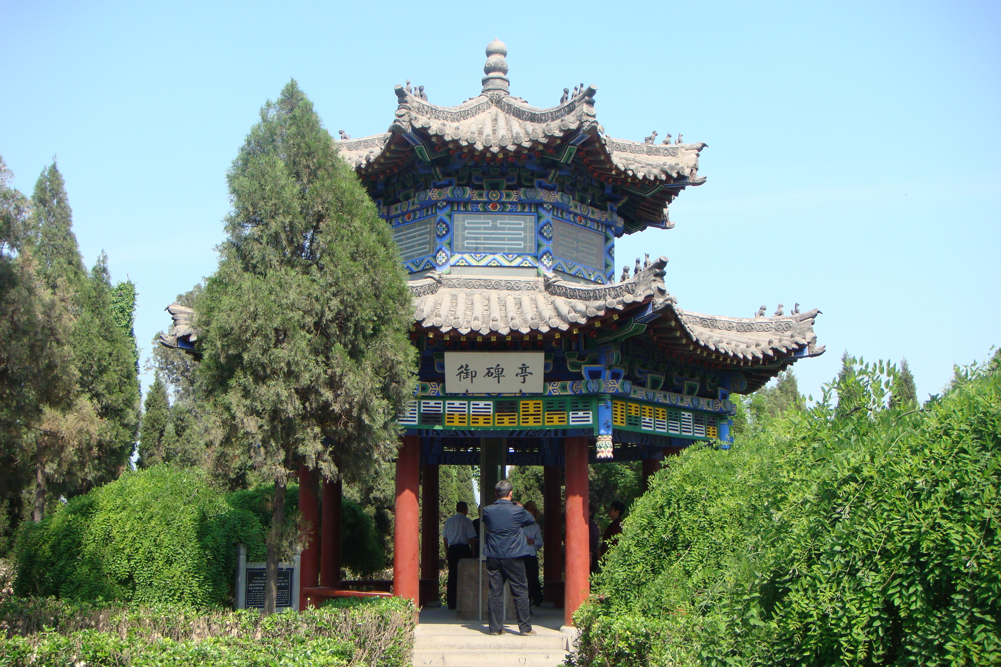 羑里城 周公庙 御碑亭